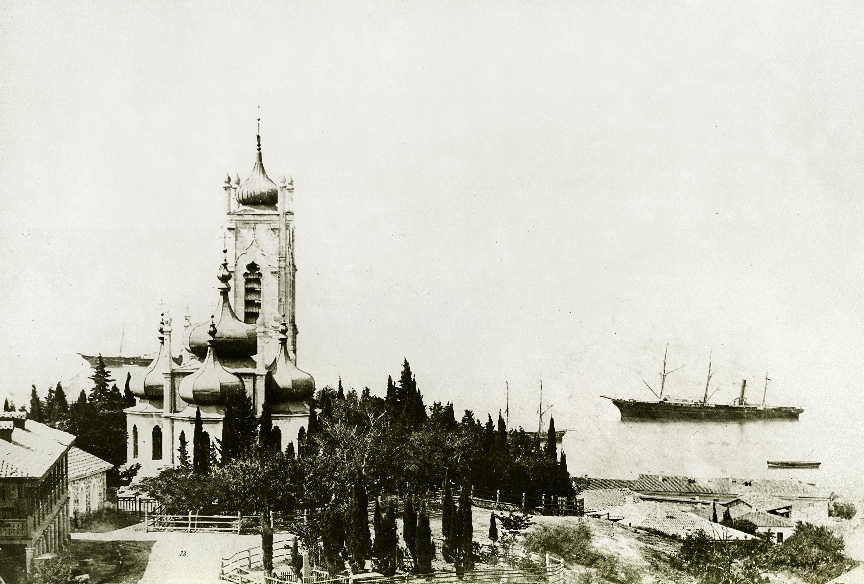 Собор Иоанна Златоуста в 19 веке